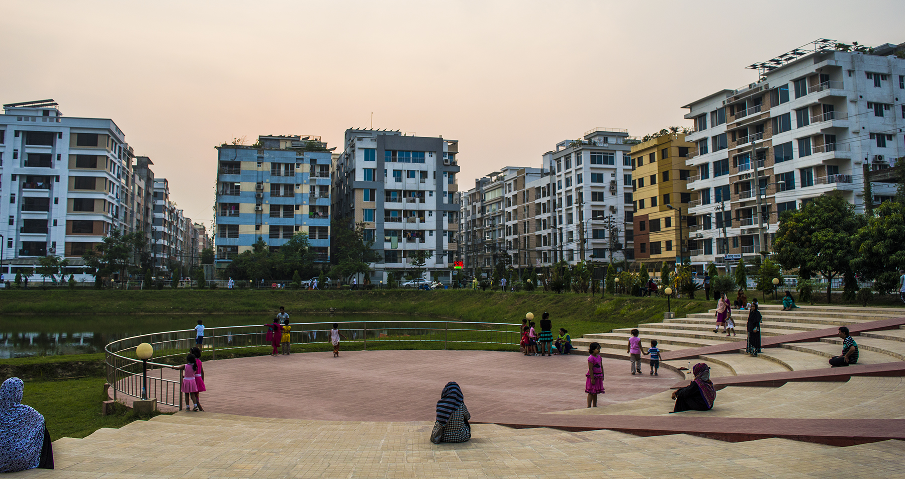 Dhaka